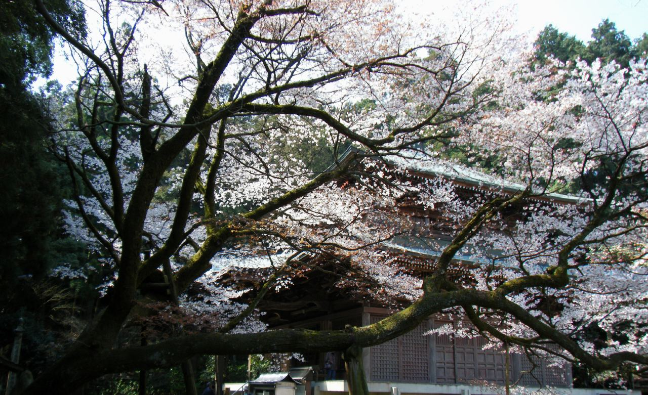 三角寺の山桜は樹齢約３００年の古木である